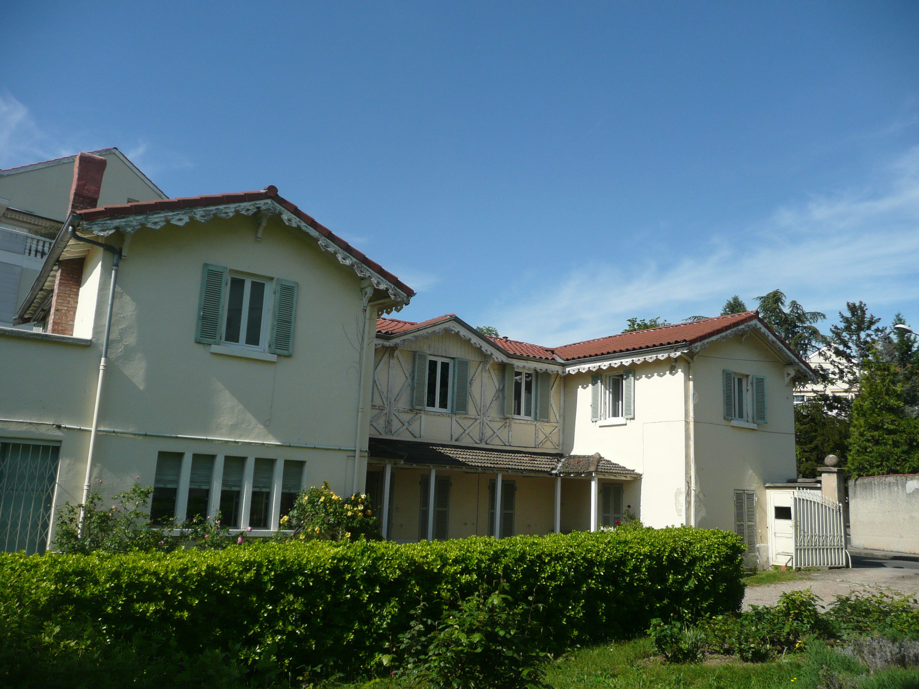 Maison annexe de la villa Ingouville à Lyon, siège de l'AMM (association médicale missionnaire) ancienne léproserie connue sous le nom de clinique du Saint-Rédempteur